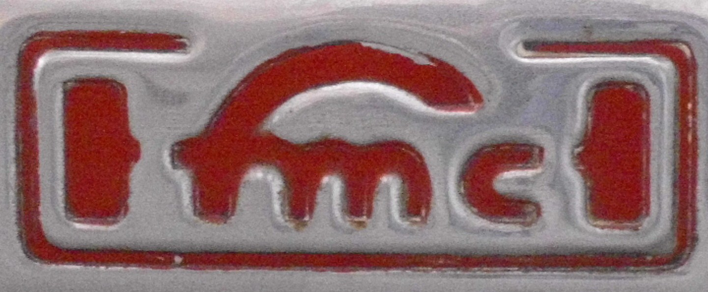 Emblem FMC an einem Francisco Jeepney